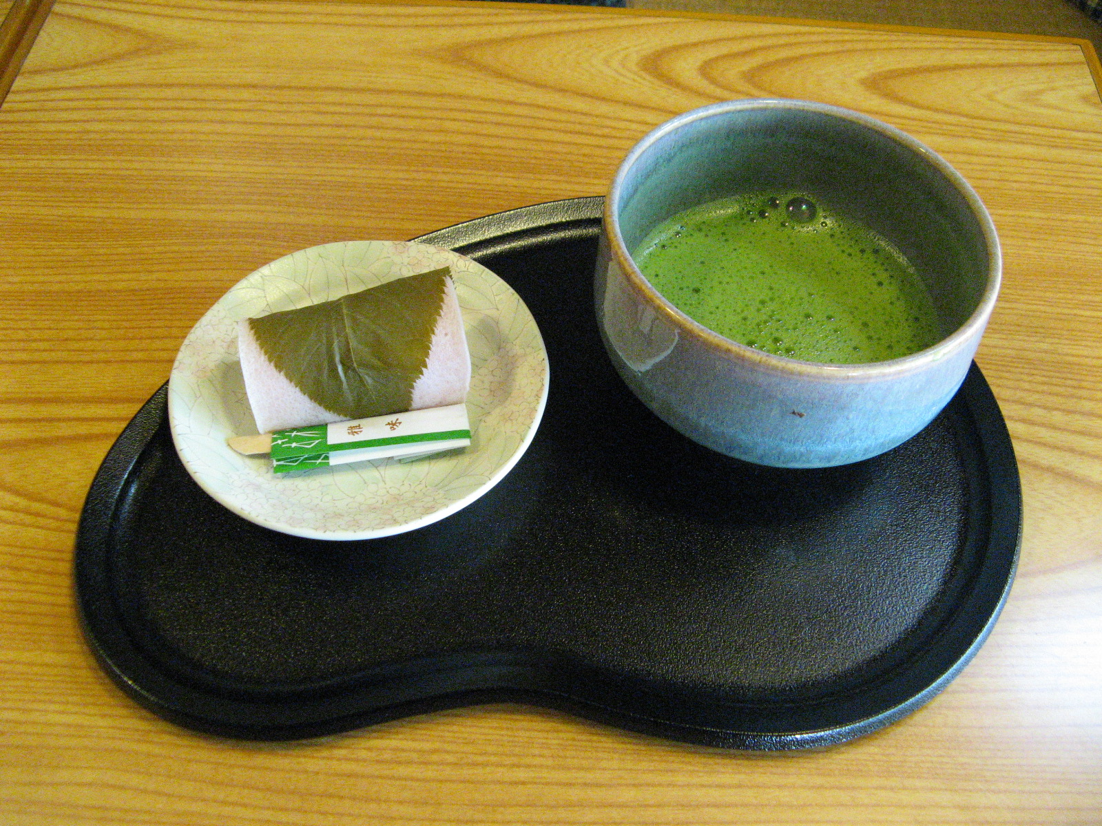 matcha